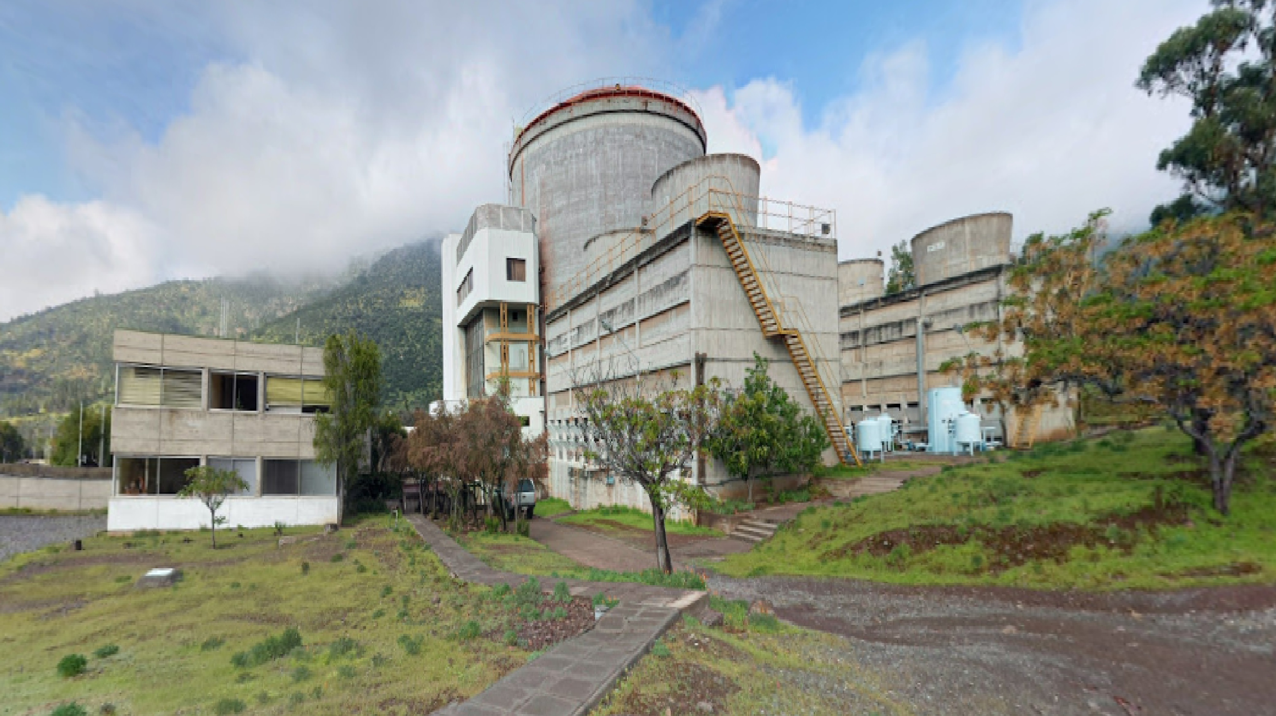 CEN Lo Aguirre Ubicado en el Kilómetro 22 de la Ruta 68 Santiago-Valparaíso Inicialmente iba a ser el CENE (Centro de Estudios Nucleares del Ejercito), sin embargo con el decreto de ley 1507 pasó a ser propiedad de la CChEN. Desde febrero del 2010 el Reactor de este centro se encuentra inactivo y sin combustible.